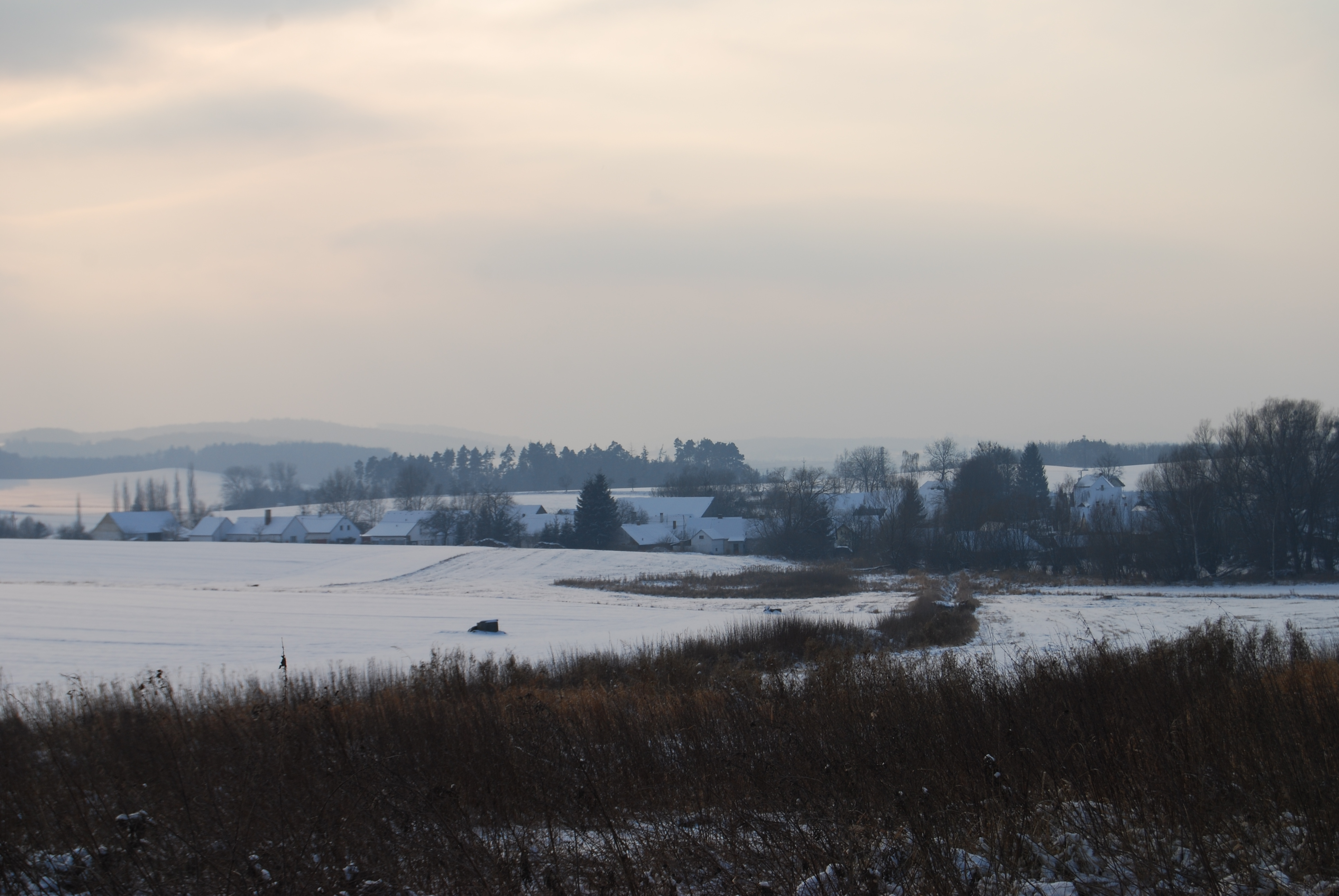 Pohled na obec od zámku. Drhovle. Okres Písek. Česká republika.